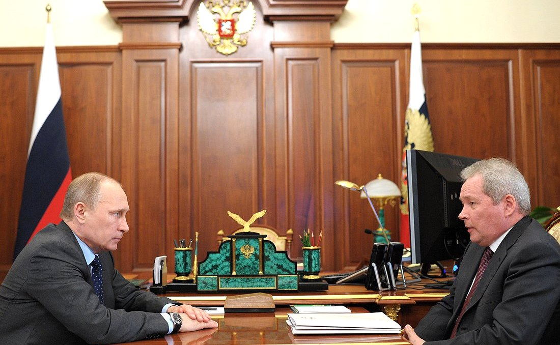 Президент России Владимир Путин с губернатором Пермского края Виктором Басаргиным